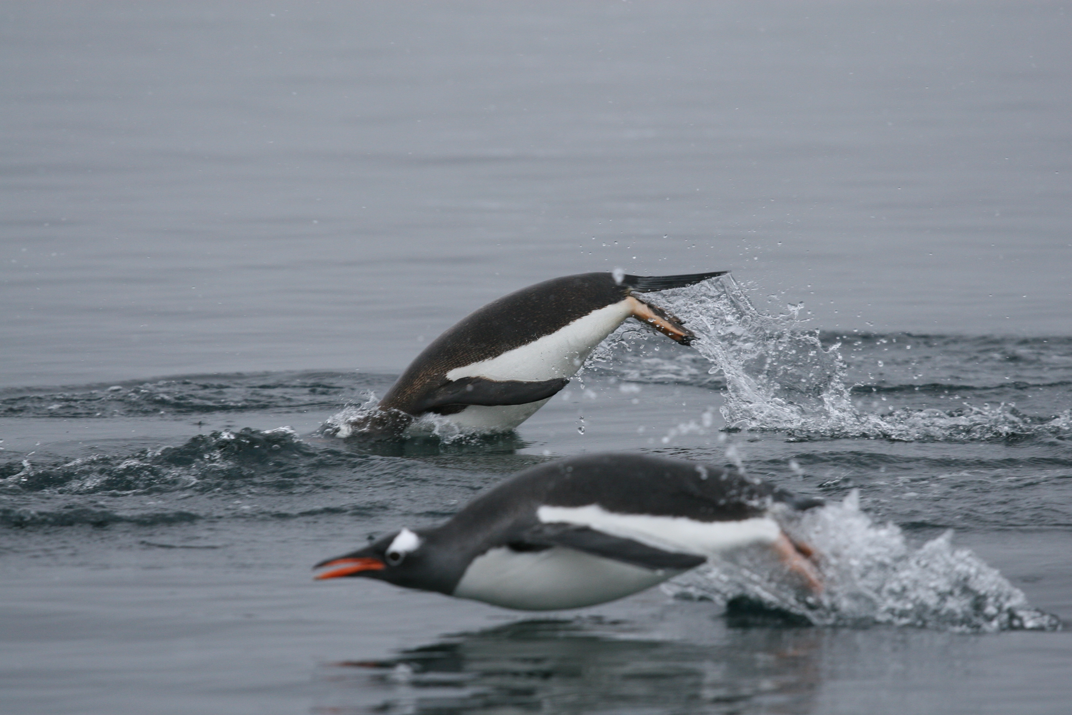 Pygoscelis papua.